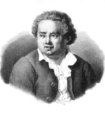 Domenico Cimarosa (1749-1801), incisione di Luigi Bridi.